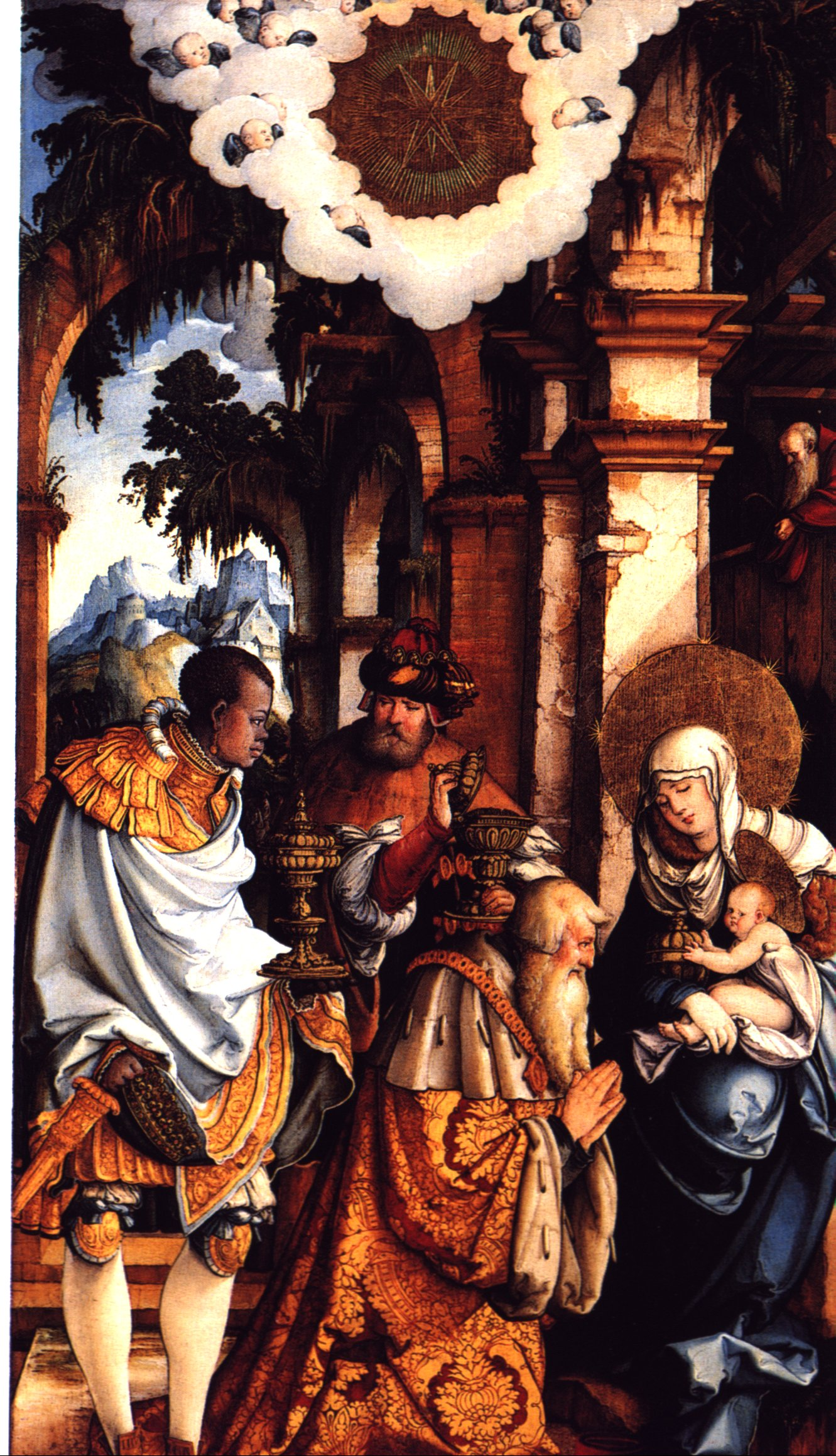 Mittelstück des ehemaligen Hochaltars der St. Martinskirche, Anbetung der Heiligen Drei Könige